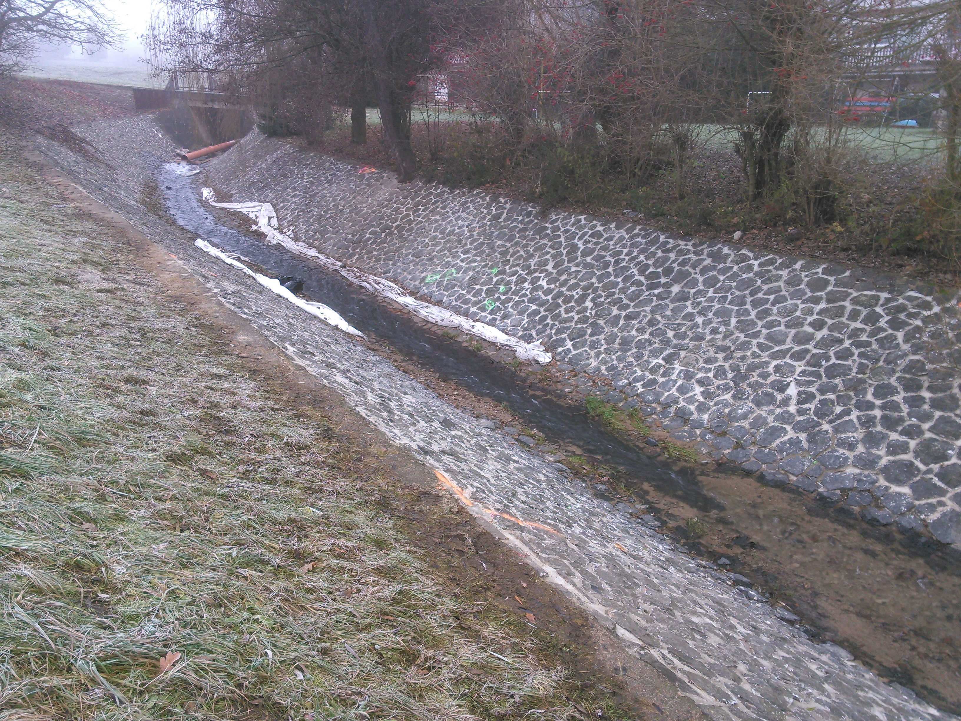 Potok